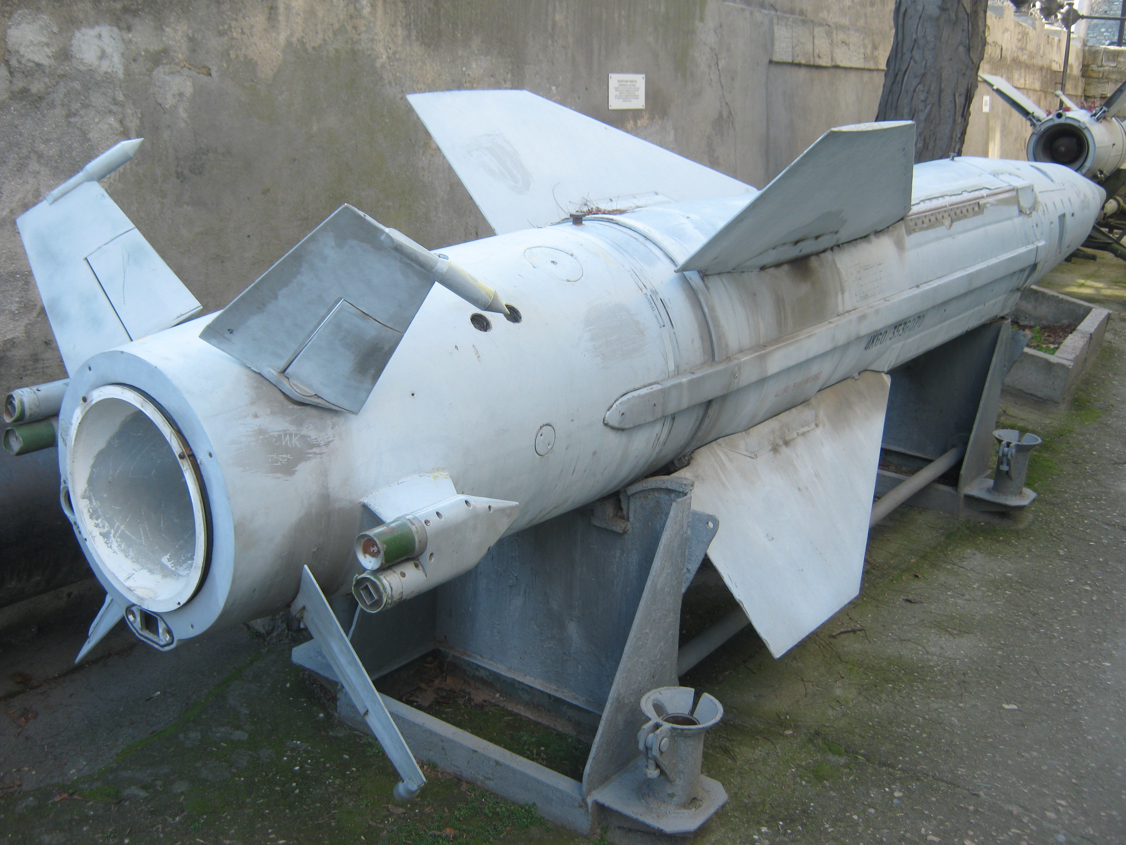 Ракета М-11 "Шторм" из экспозиции музея Черноморского флота в Севастополе